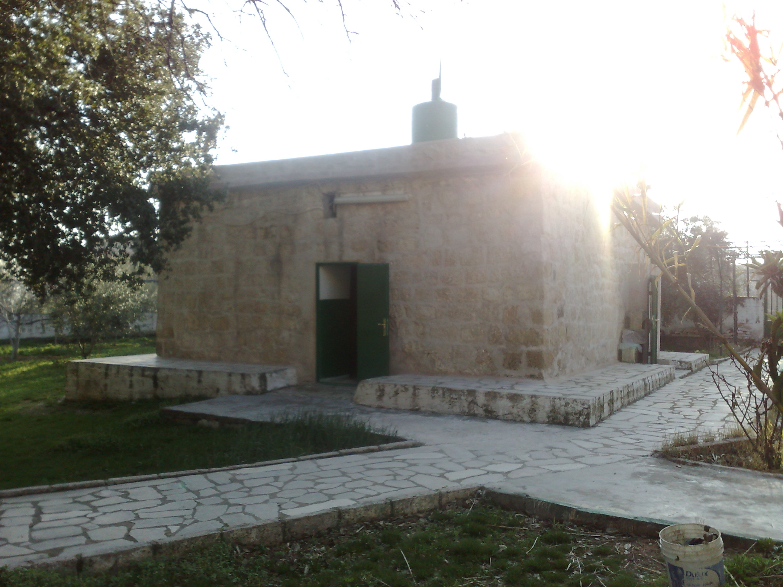 Jordan/Mahis